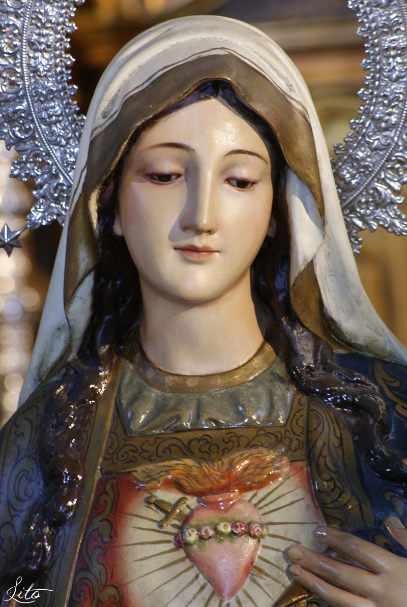 Fotografía propia realizada por Manuel Francisco Álvarez Ruiz.